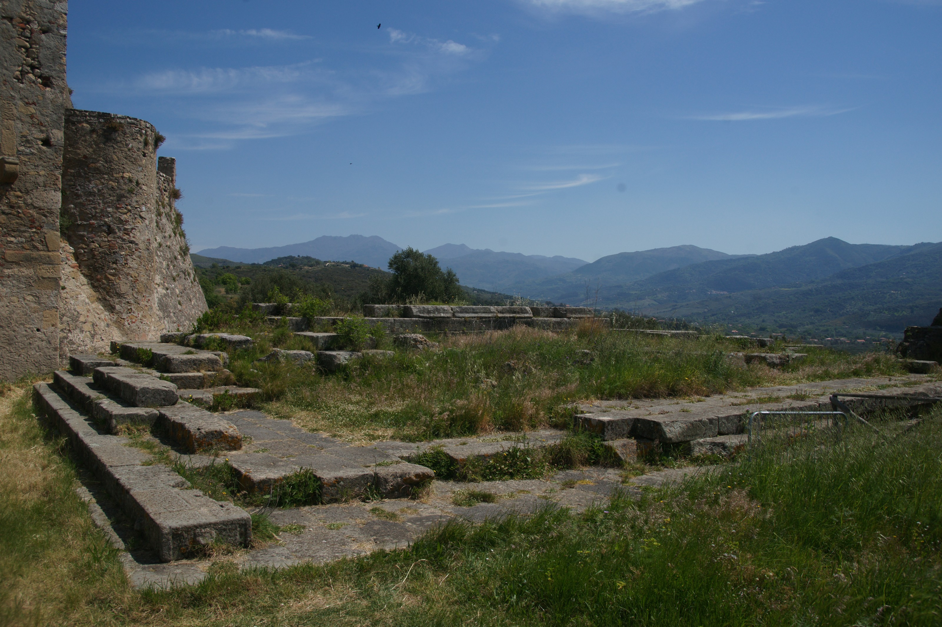 Elea - Velia: Akropolis - Tempelfundamente